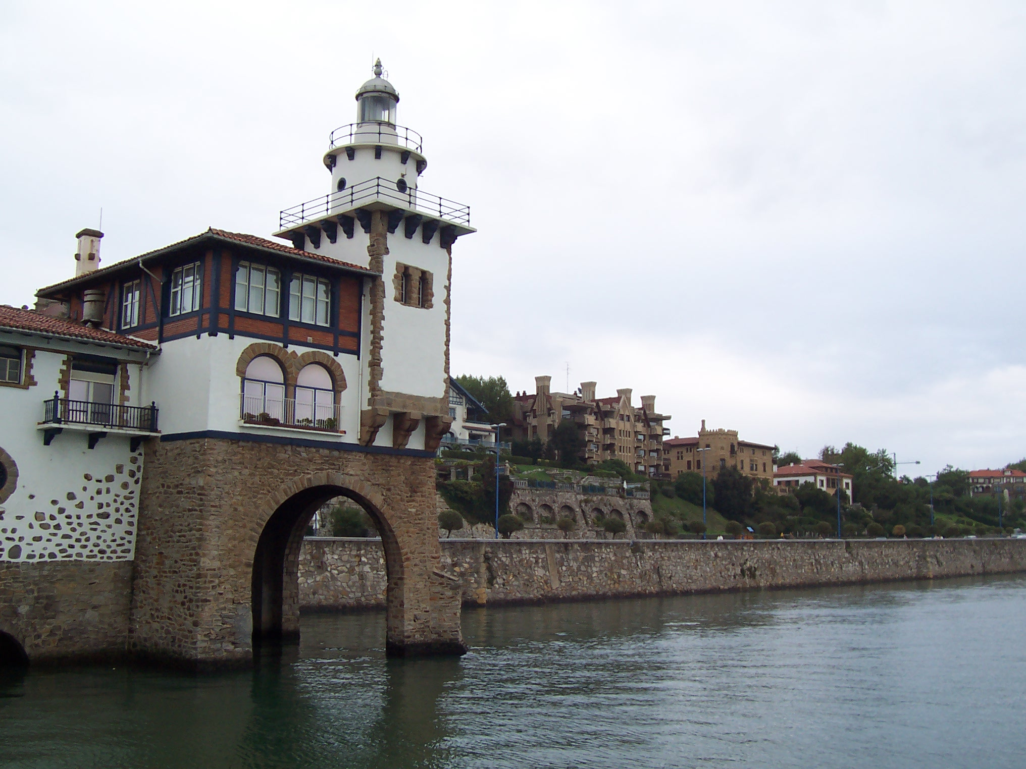 Esta foto es mía propia. Así que no hay pegas de copyright